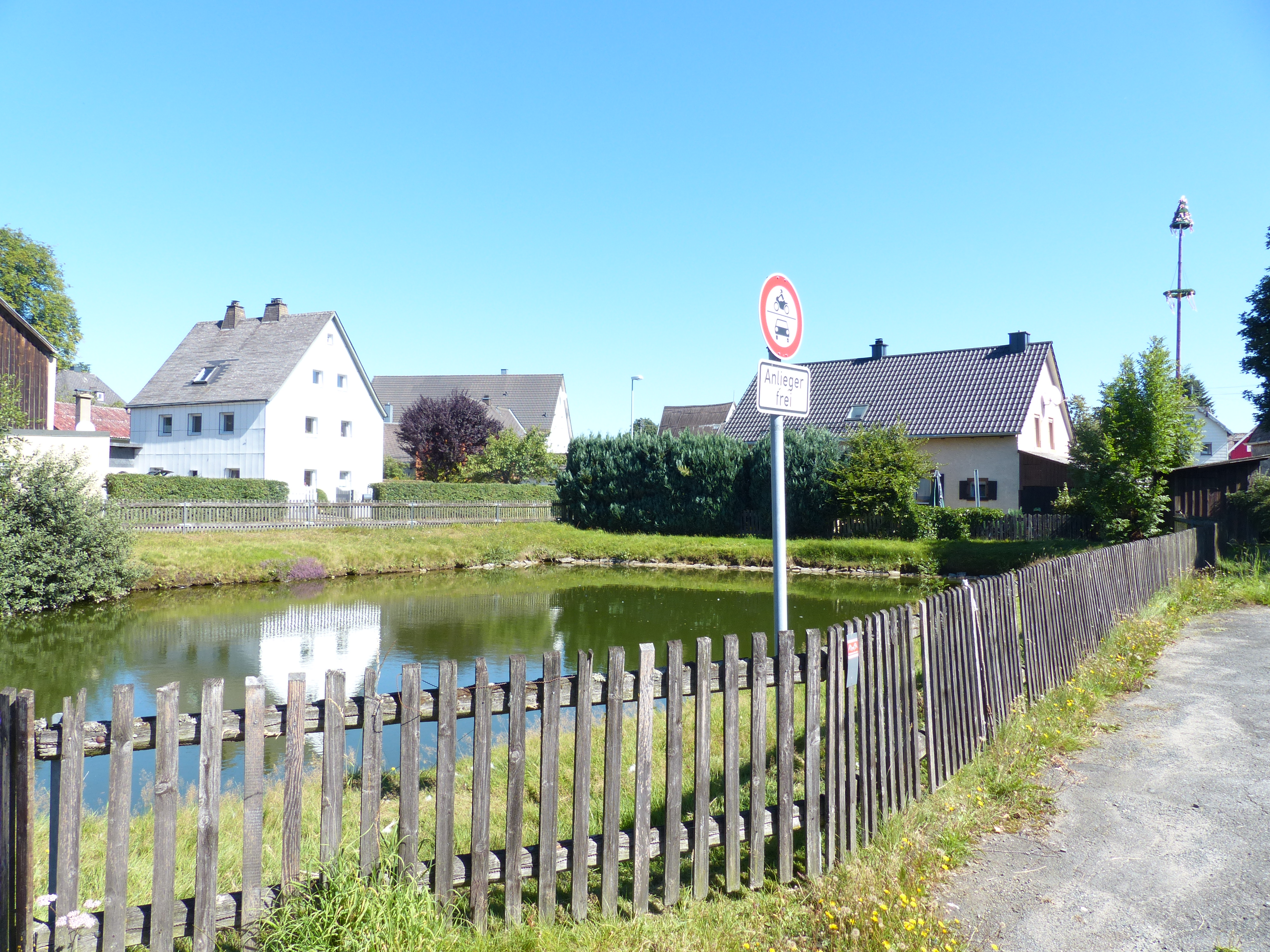 Dorfteich in Ortsmitte von Gundlitz